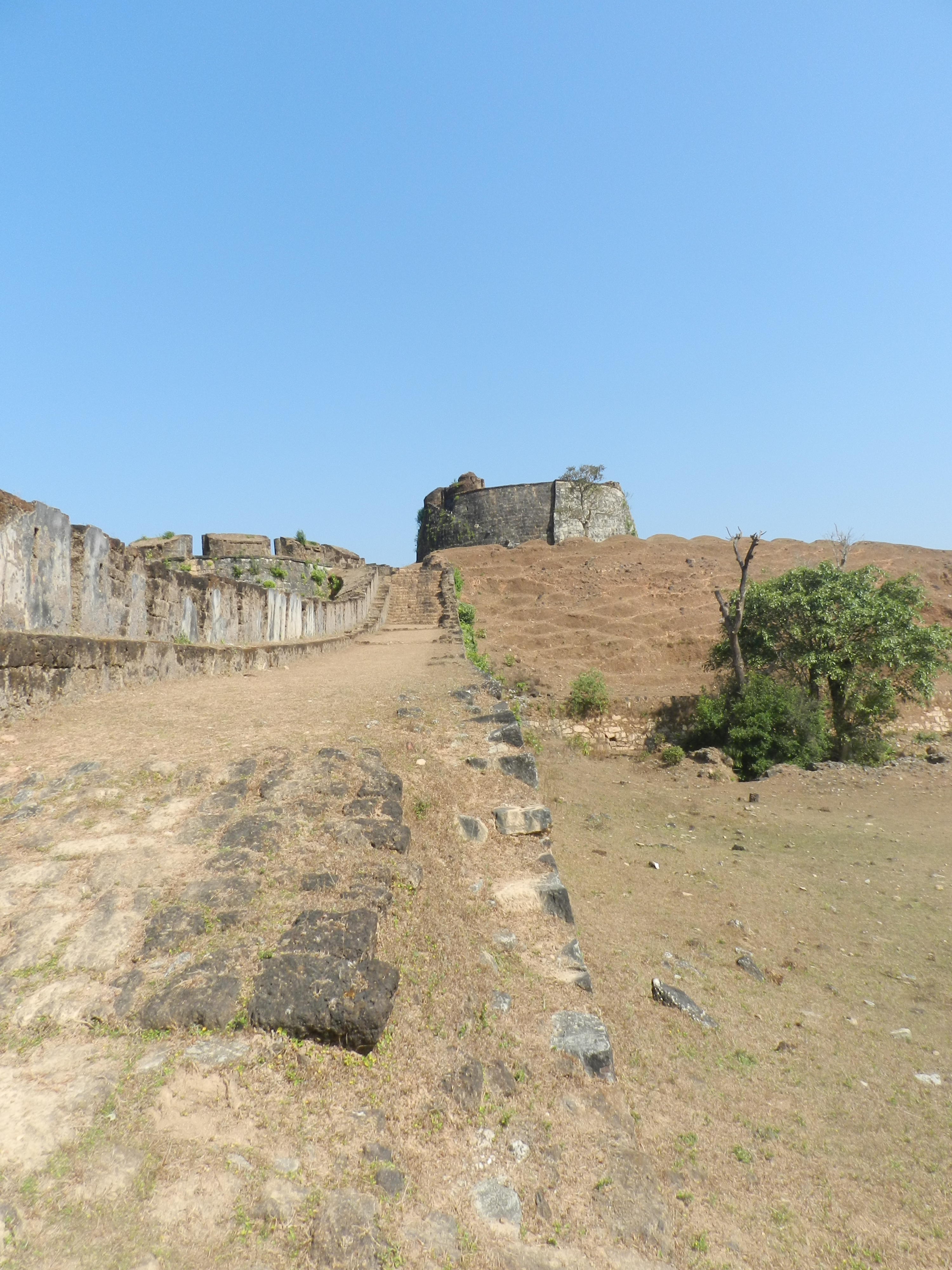 ಕನ್ನಡ: ಕೋಟೆಯ ನೋಟ